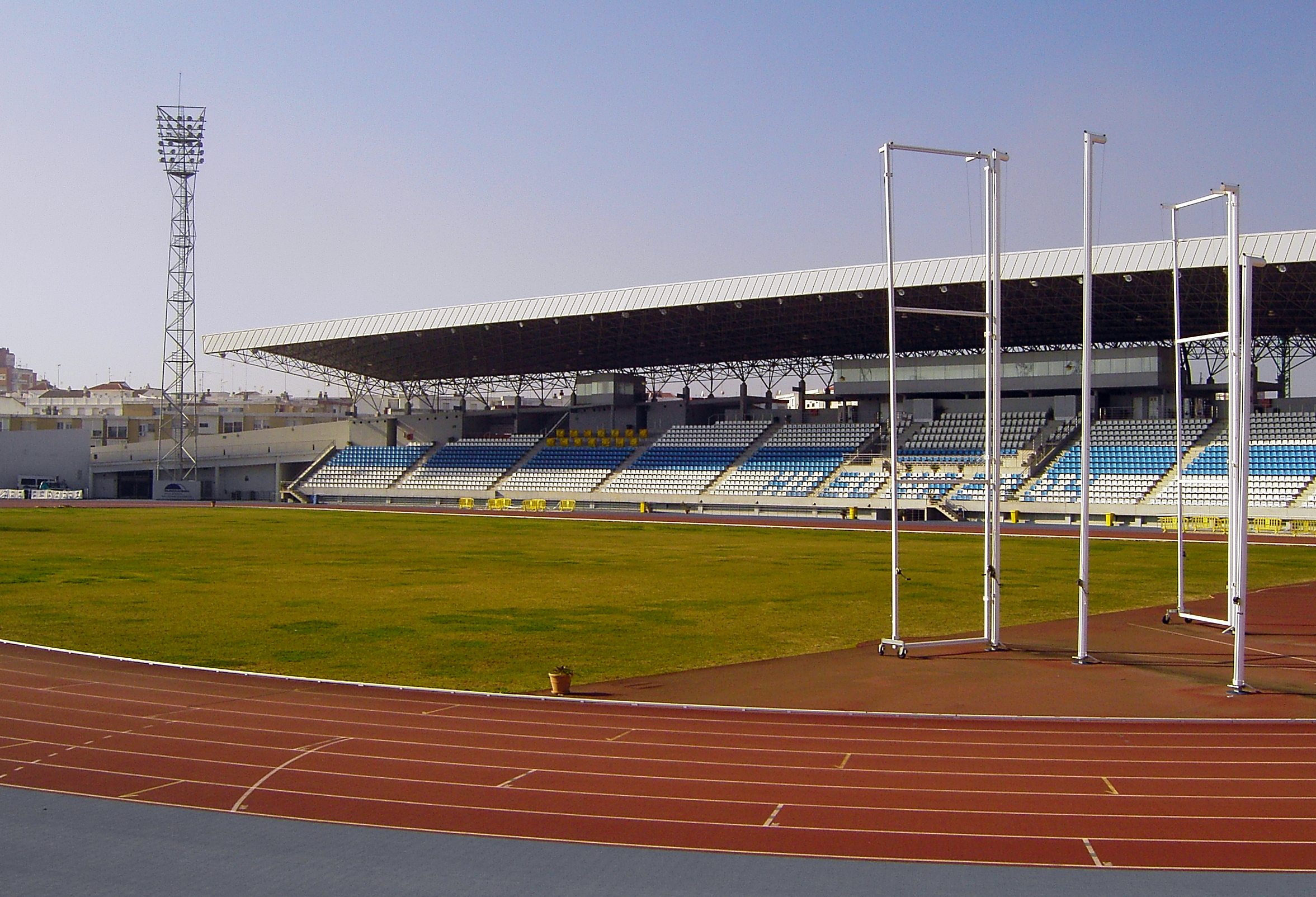 Estadio iberoamericáno de atletismo (Huelva, España)